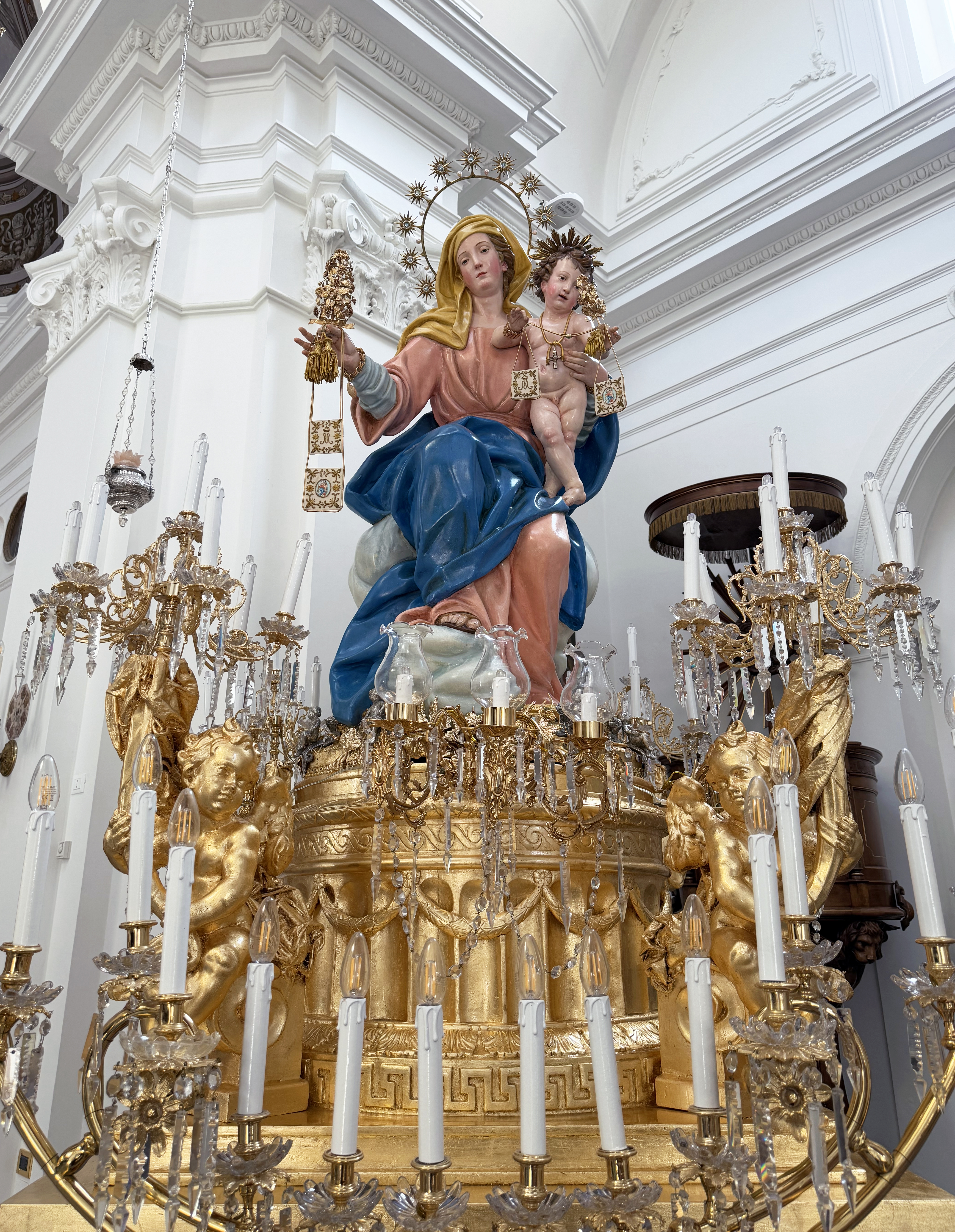 Statua della Madonna del Carmine, legno policromo, 1790. Opera dei fratelli Michele e Gennaro Trillocco su modello di Giuseppe Sanmartino. Sansevero, chiesa del Carmine.